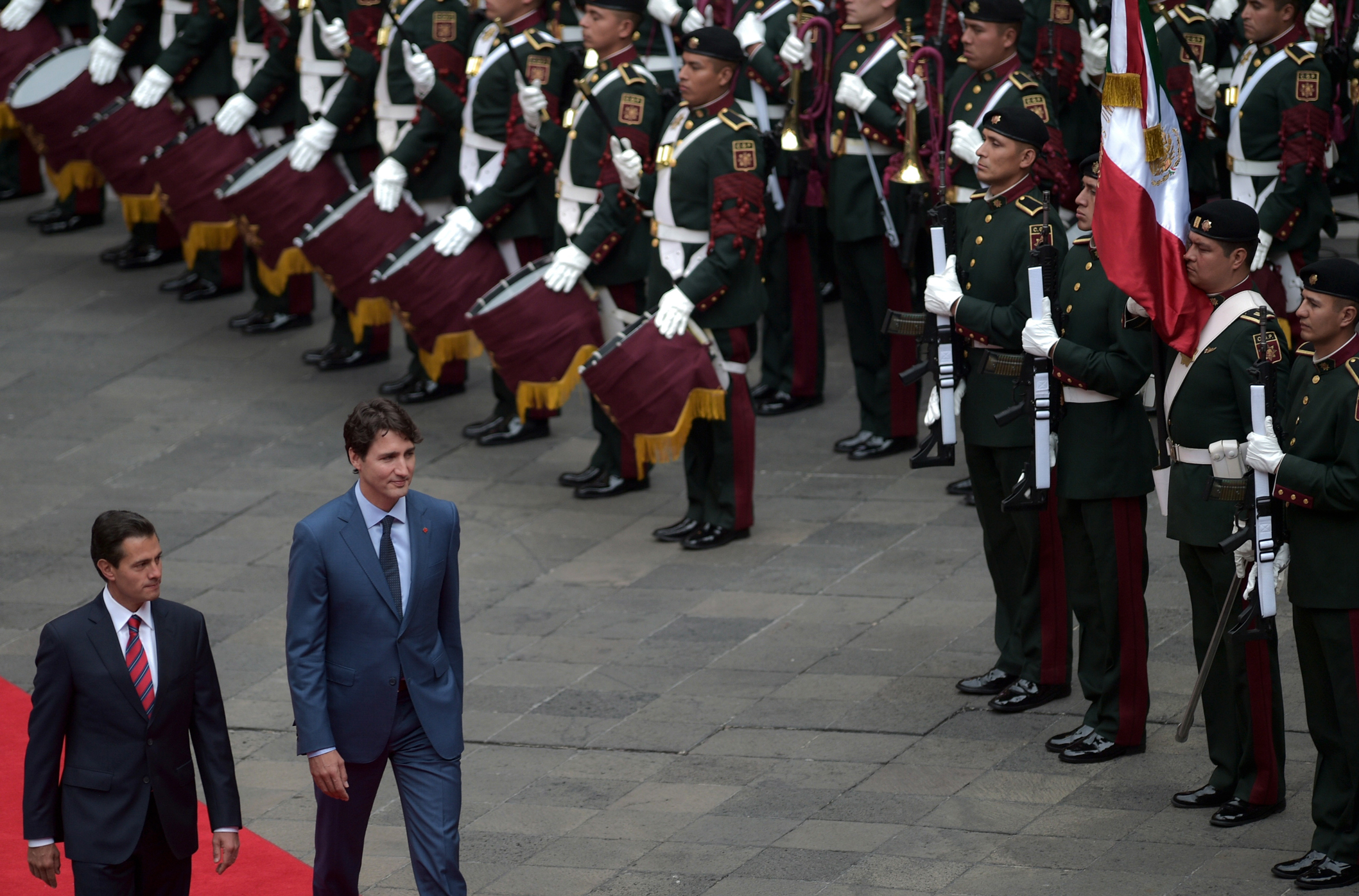 El Presidente Enrique Peña Nieto, acompañado de su esposa, Angélica Rivera de Peña, dio la bienvenida al Primer Ministro de Canadá, Justin Trudeau, quien realiza una Visita Oficial a México, y a su esposa, Sophie Grégoire-Trudeau.